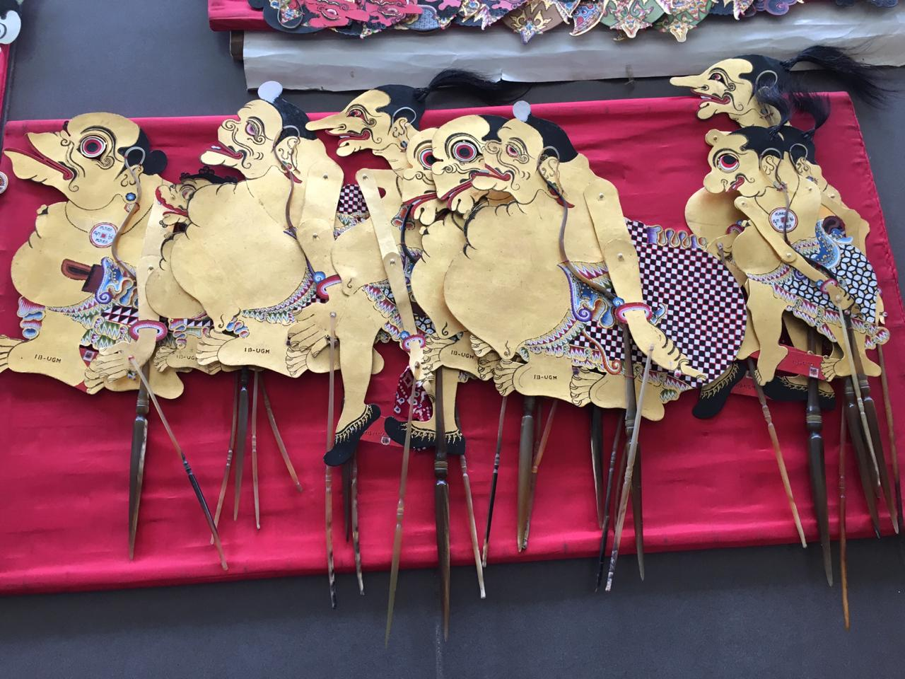 Wayang Punakawan adalah salah satu wayang yang biasa muncul di pagelaran wayang untuk mengisi bagain goro-goro.